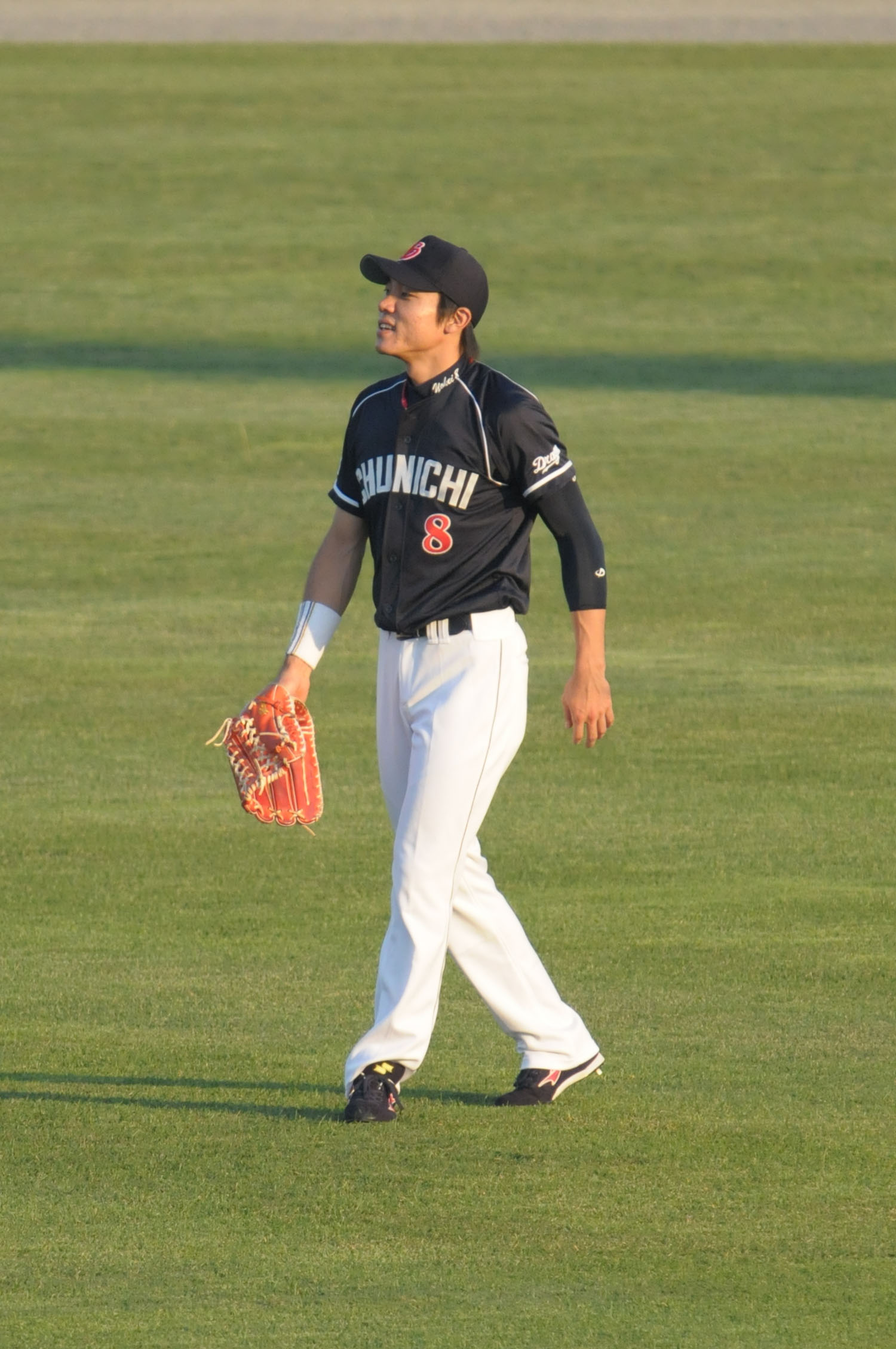 中日ドラゴンズ、大島洋平選手。こまちスタジアムで。